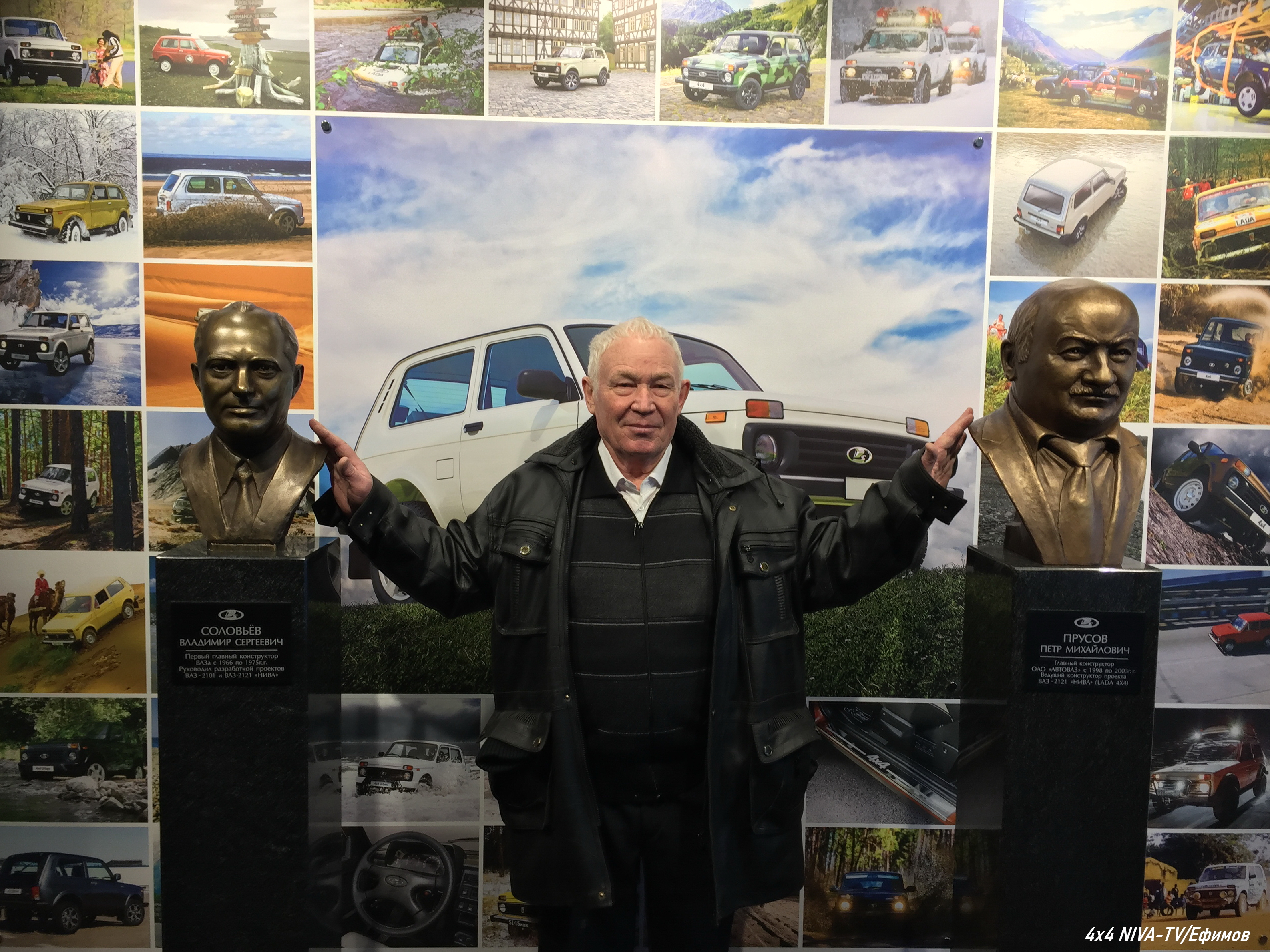 Ведущий дизайнер проекта ВАЗ-2121 "Нива" Валерий Сёмушкин у бюстов первого главного конструктора ВАЗа В.Соловьева и ведущего конструктора проекта ВАЗ-2121 "Нива" П.Прусова на открытии мемориальной зоны 2 марта 2018 года.